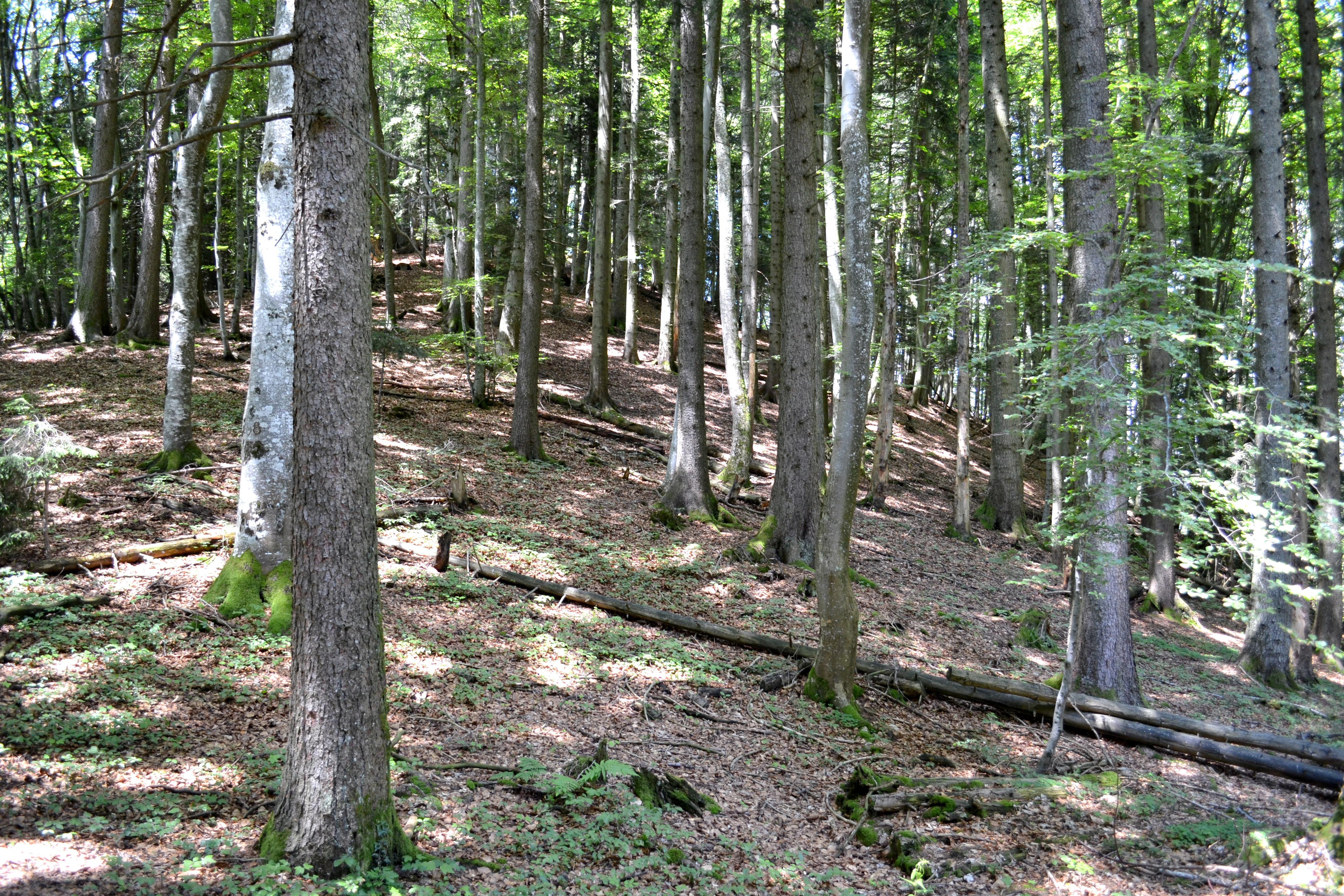 forêt suisse, tapis de feuilles mortes